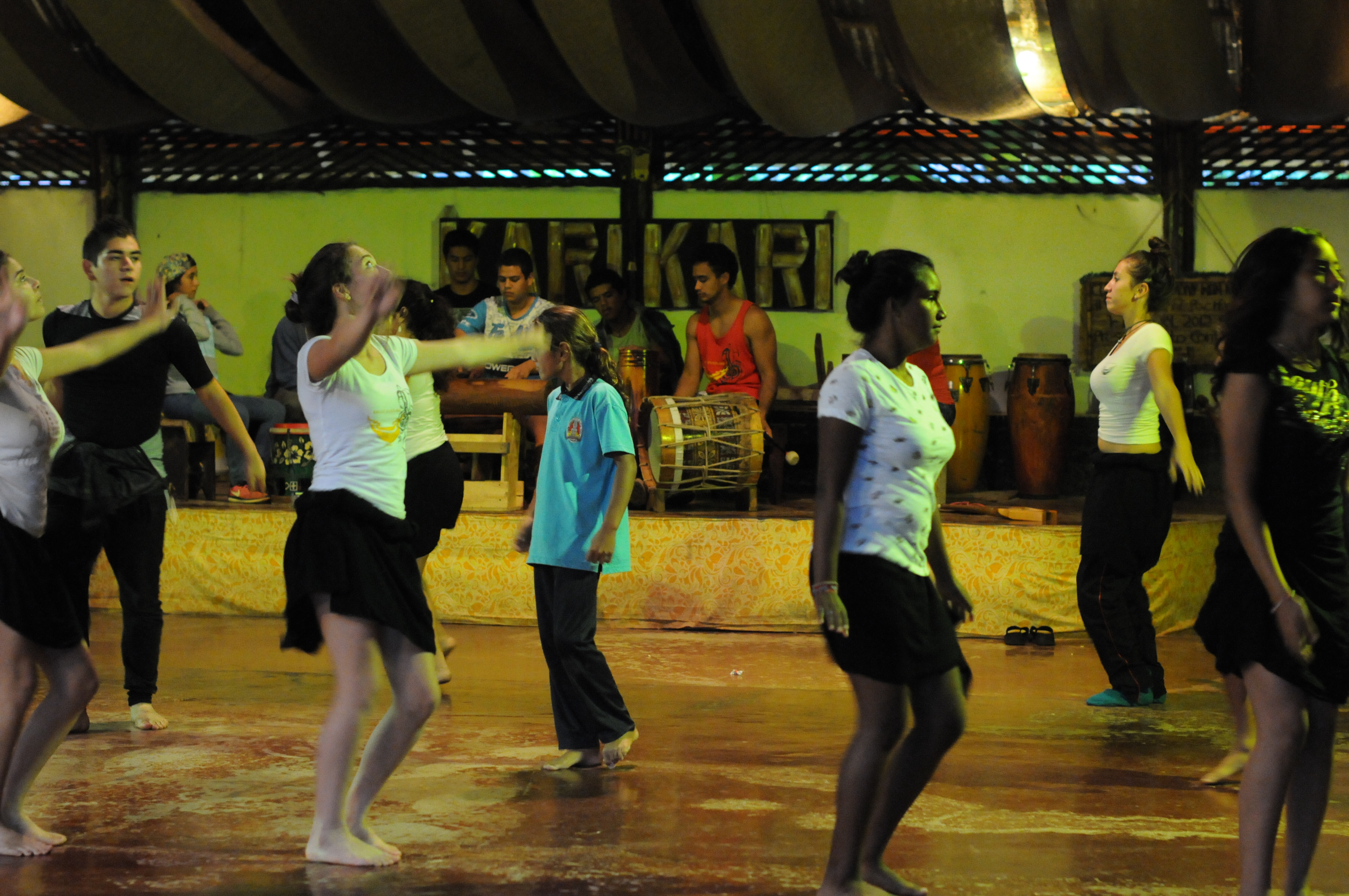 Práctica de danza y música en la academia Ma'aranui